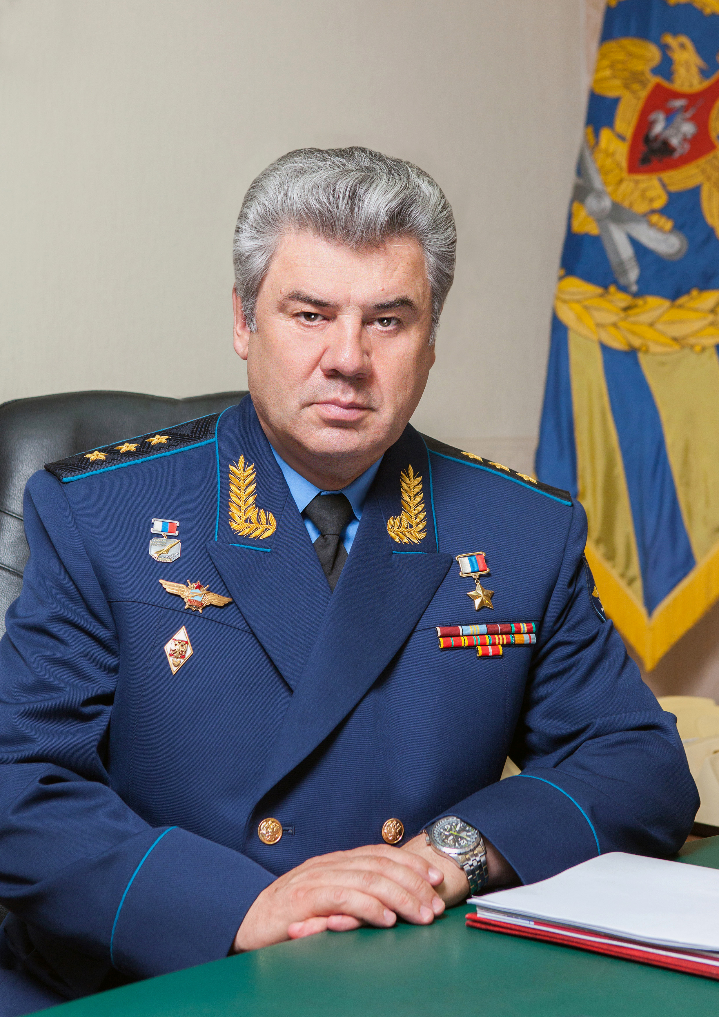 Главнокомандующий Военно-воздушными силами генерал-полковник Виктор Николаевич Бондаре